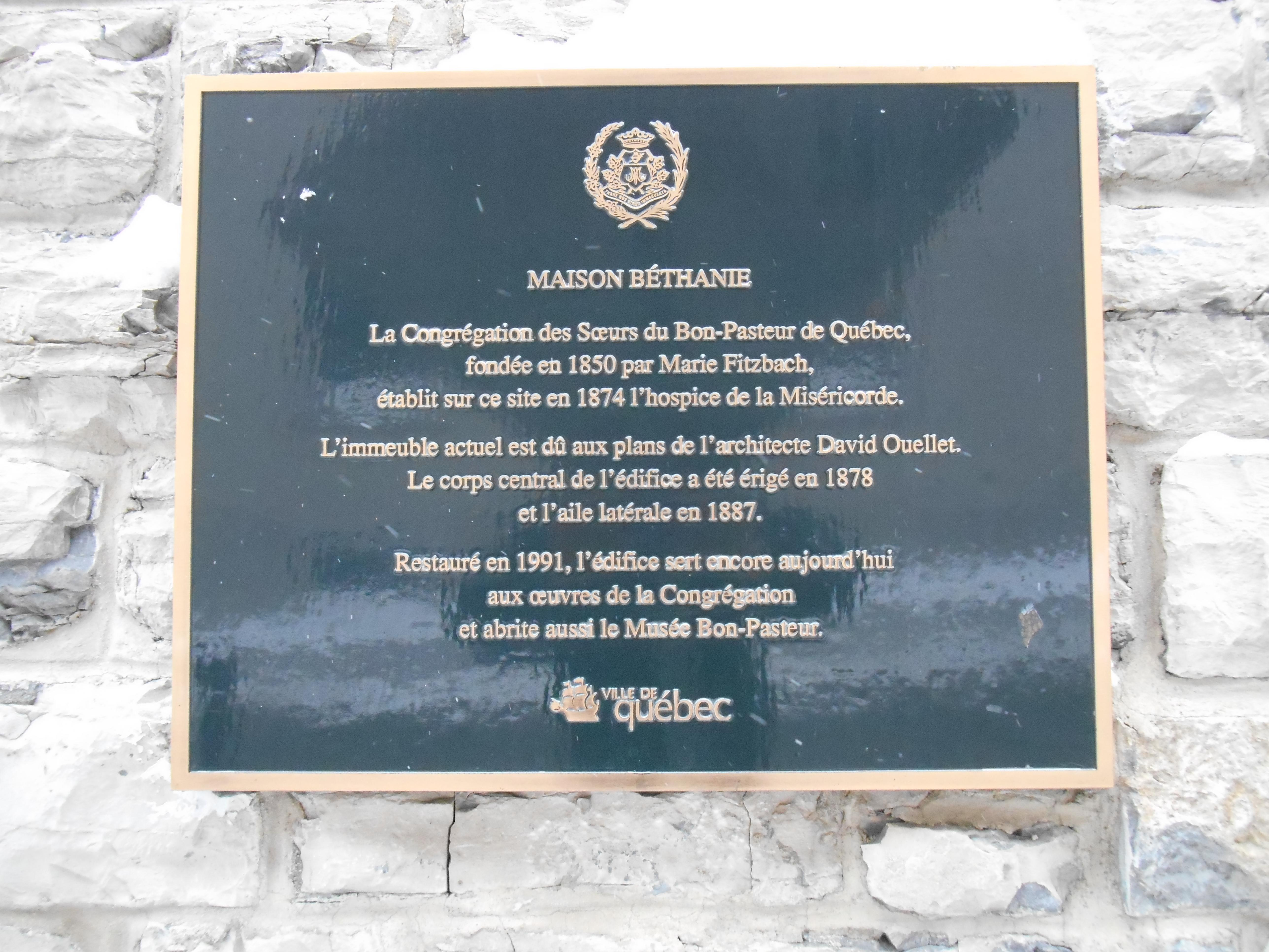 Musée Bon-Pasteur, 14, rue Couillard, Québec Plaque de la maison Béthanie Texte de la plaque « Maison Béthanie La Congrégation des Soeurs du Bon-Pasteur de Québec, fondée en 1850 par Marie Fitzbach, établit sur ce site en 1874 l'hospice de la Miséricorde. L'immeuble actuel est dû aux plans de l'architecte David Ouellet. Le corps central de l'édifice a été érigé en 1878 et l'aile latérale en 1887. Restauré en 1991, l'édifice sert encore aujourd'hui aux oeuvres de la Congrégation et abrite aussi le Musée Bon-Pasteur. »